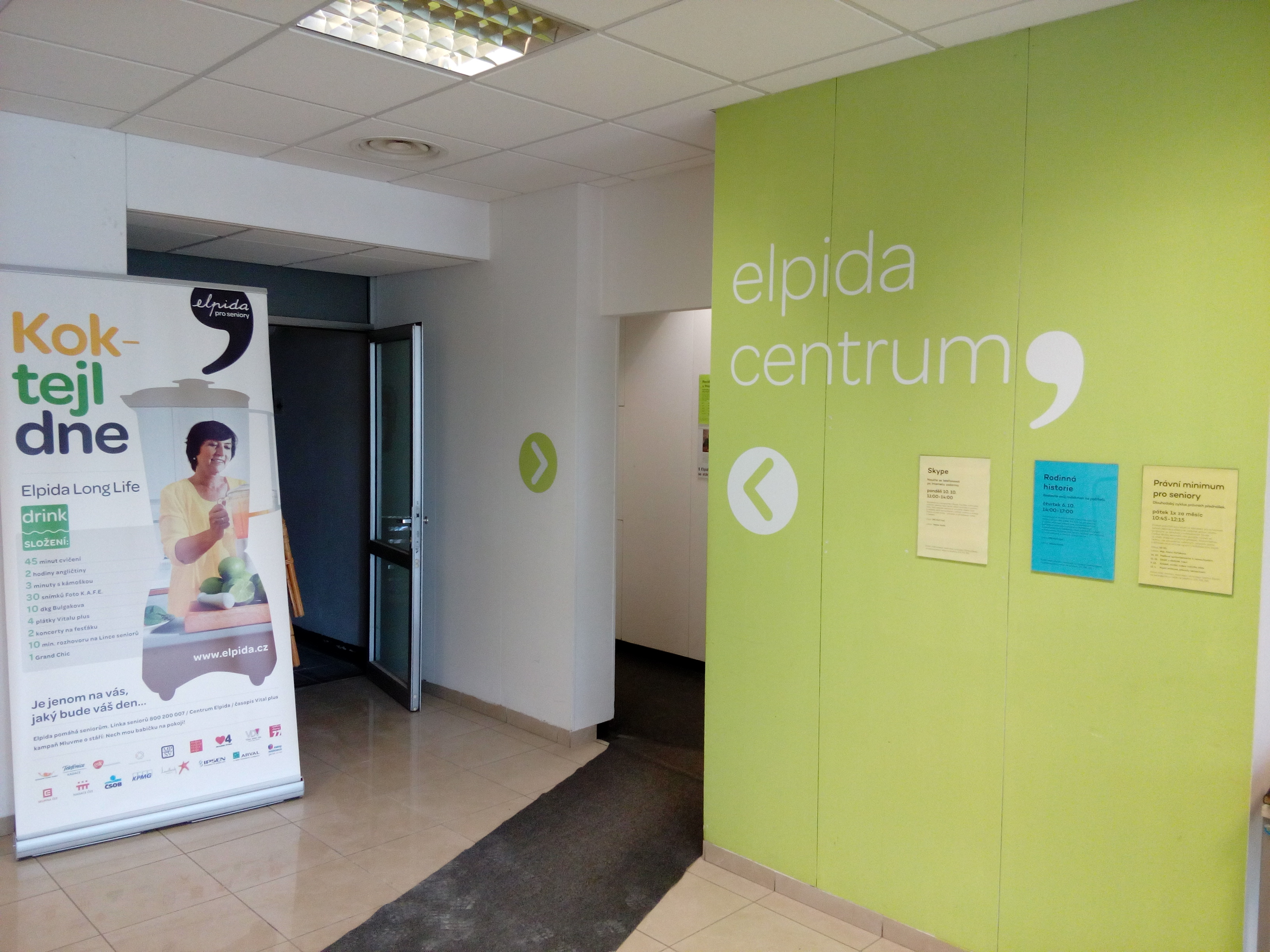 Pankrác